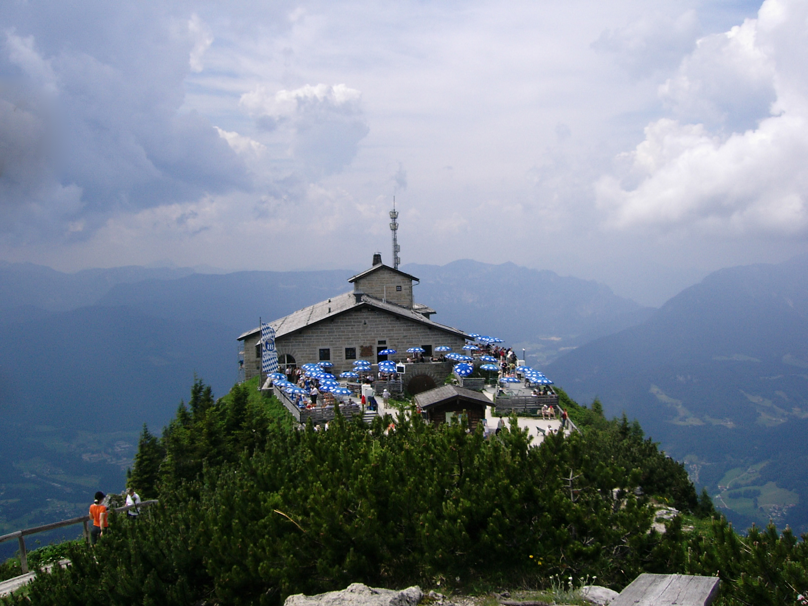 Bildbeschreibung: Das Kehlsteinhaus Fotograf/Zeichner:Florian S. Datum: 28.06.2005